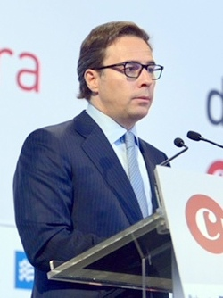 D. Cambra amb Dimas Gimeno, President del Consell d'administració de "El Corte Inglés", 6 de març de 2018